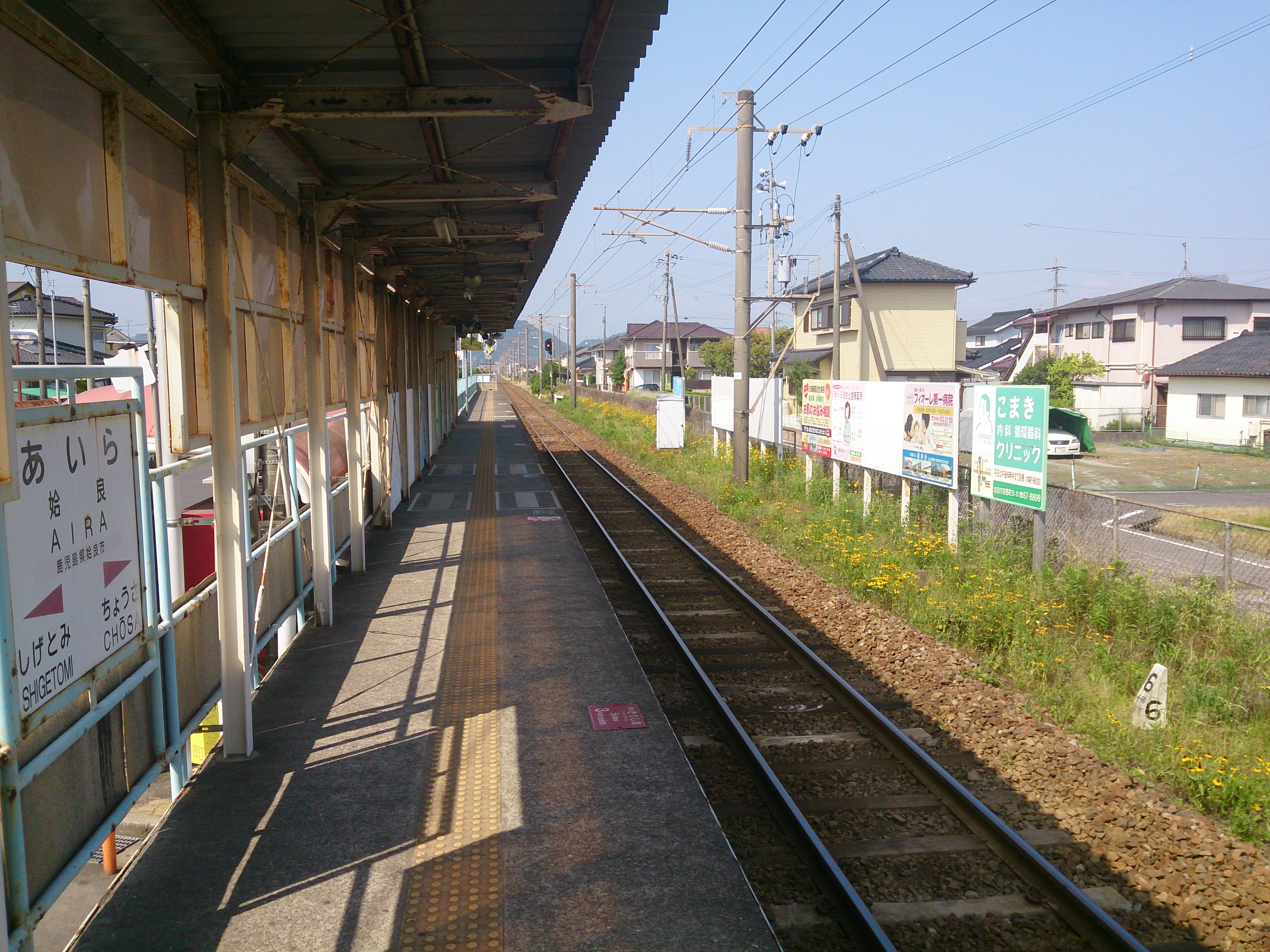 姶良駅 ホーム（国分方）